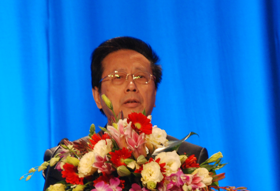 陈昌智，全国人大常委会副委员长，民建中央主席。